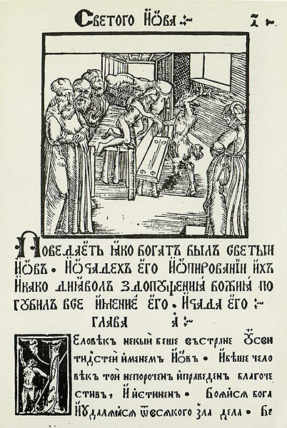 Скарына. "Іоў", 10 верасня 1517 г. (ліст 1, 4). 8,7 Х 8,6